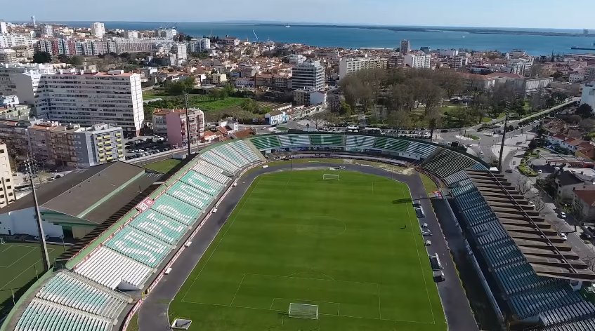 Vista aérea do estádio.